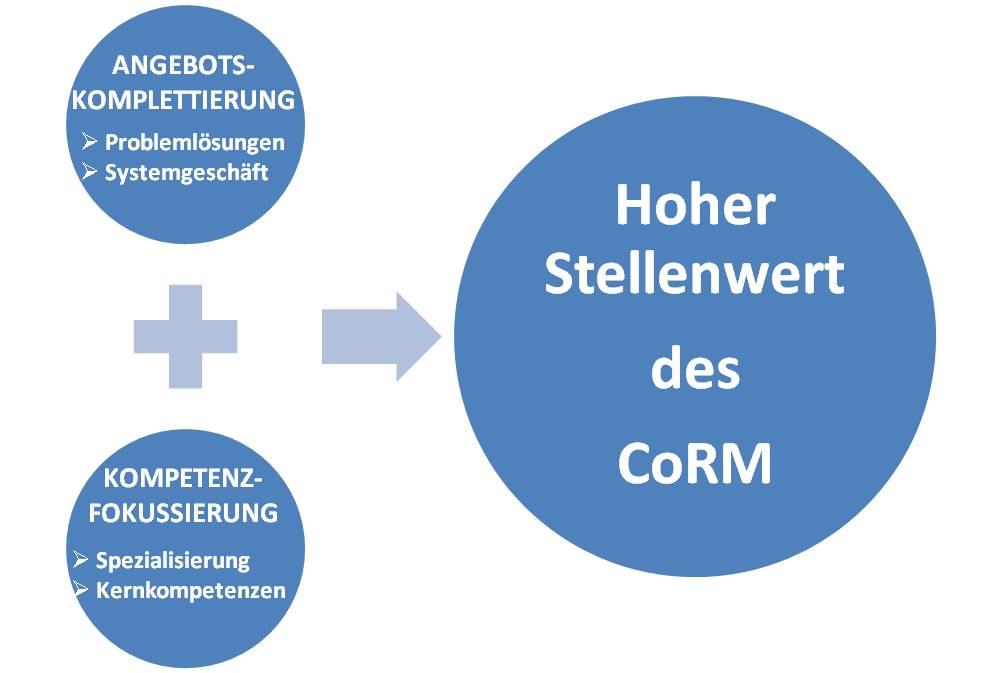 Komplexe Kundenbedarfe und eine Kernkompetenzfokussierung der komplementären Anbieter mündet in einem hohen Stellenwert der Geschäftsbeziehung zwischen den Komplementoren.